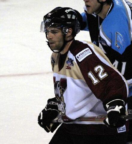 Brett Lutes